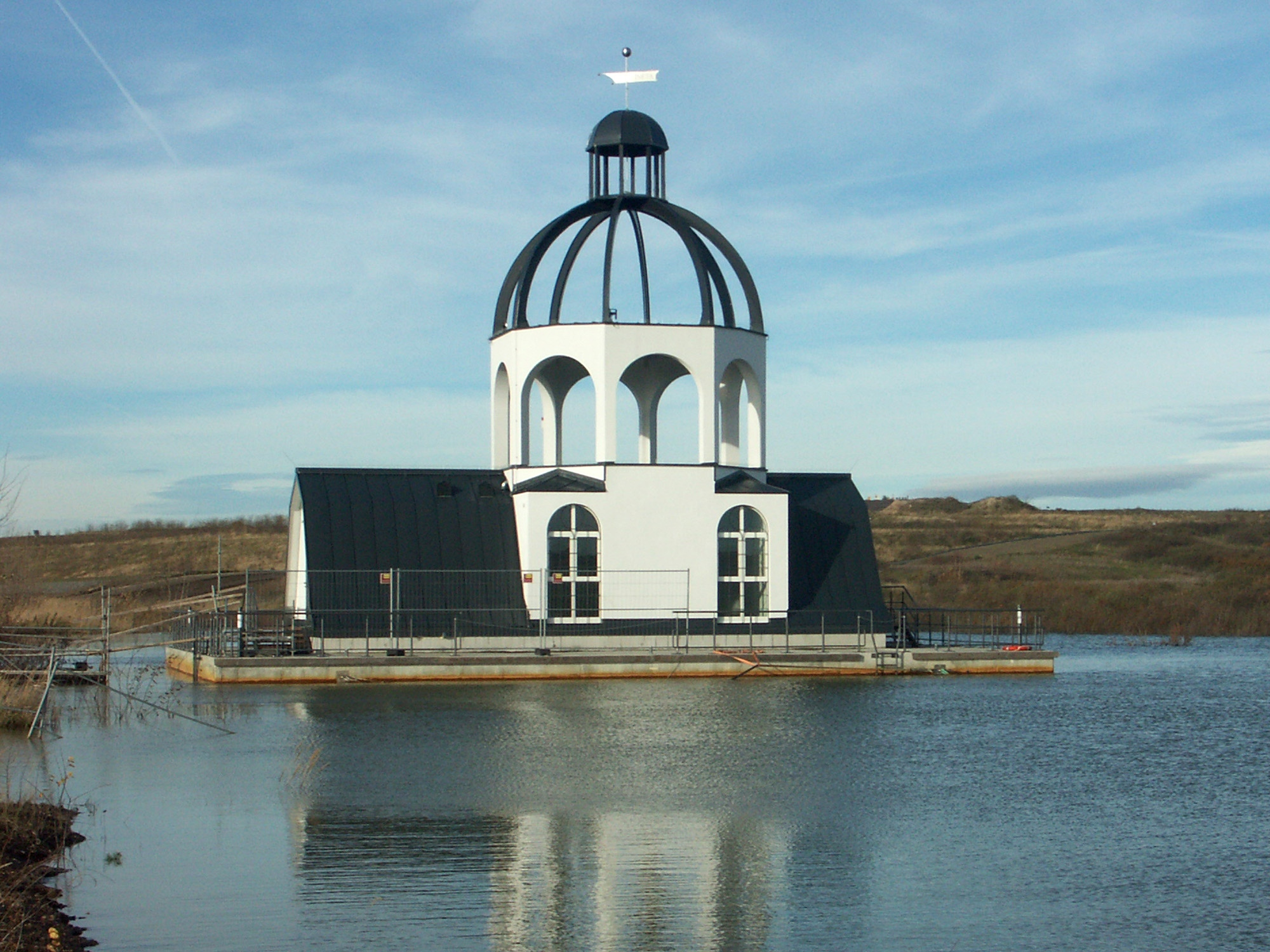 Die fertige Vineta (Kunstprojekt im Störmthaler See) vor dem Einschwimmen zum Ankerplatz, November 2010.